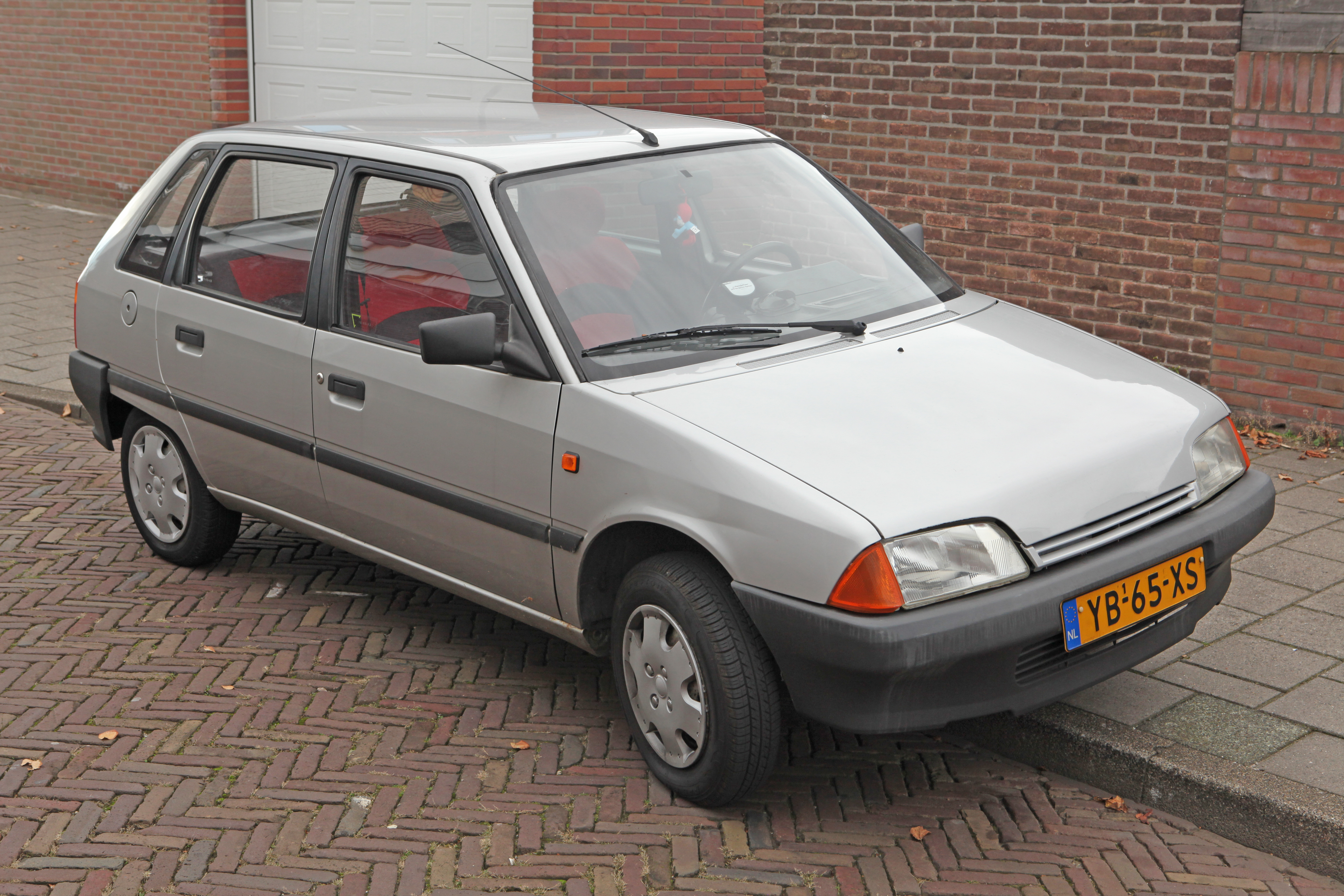 1990 Citroen AX 11 TE